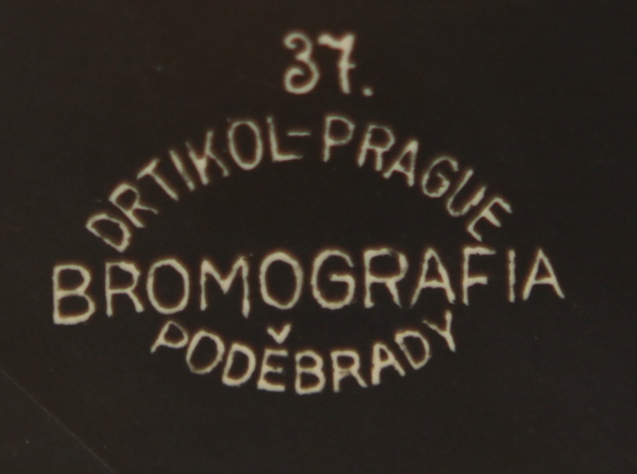 Josef Sudek Gallery